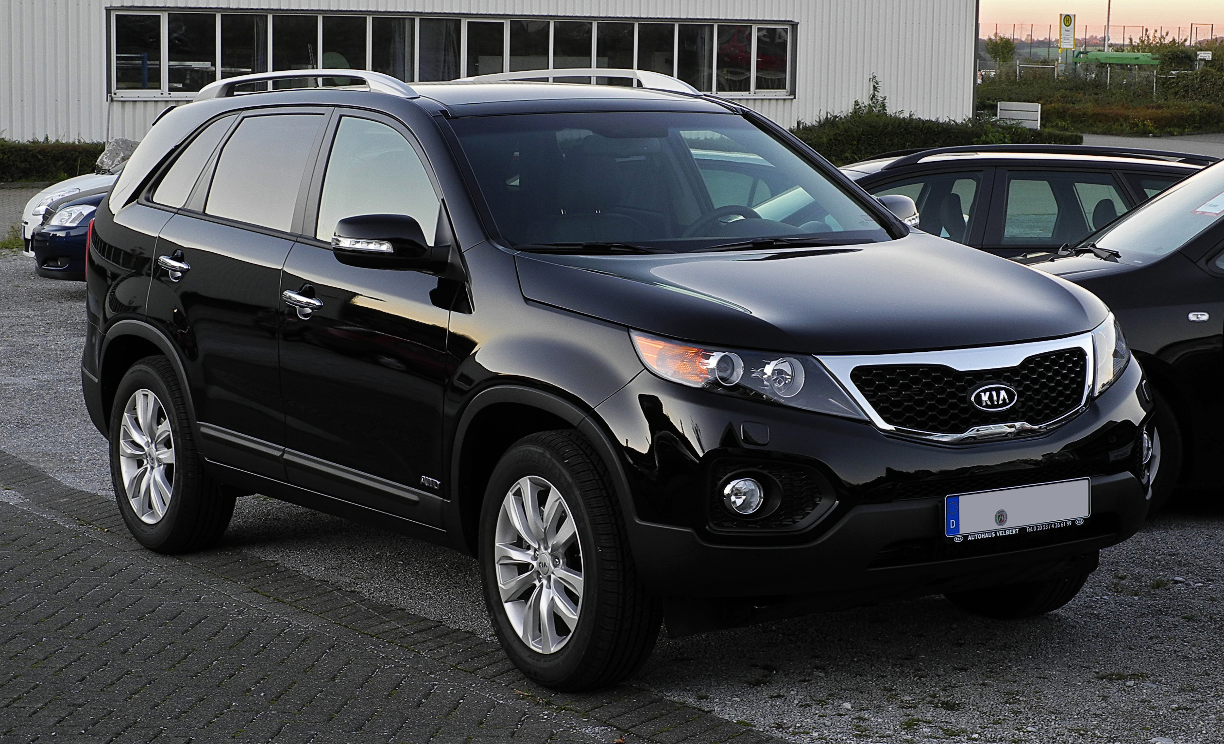 Kia Sorento 2.2 CRDi AWD Spirit (XM)